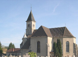 Église de Damparis (Jura) vue depuis le cimetière Photo prise le 24 avril 2004 par Lucien PRADILLON 2004 Lucien PRADILLON